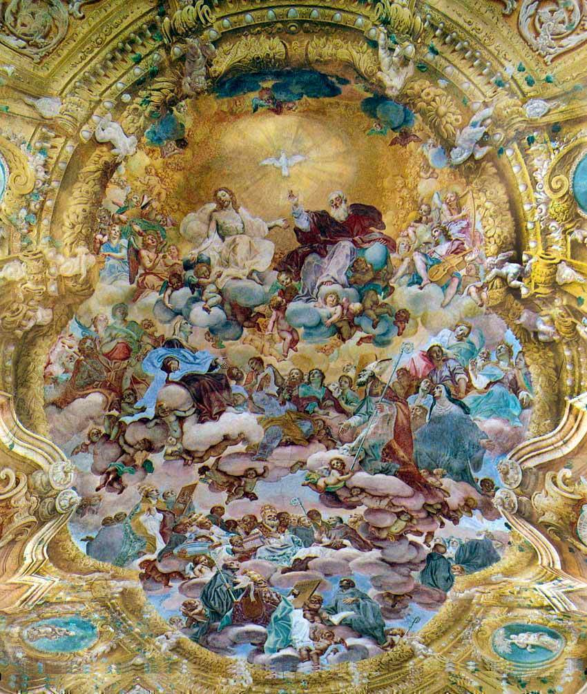 Affresco, chiesa del monastero di San Benedetto, Cremona (foto Giuliano Regis)